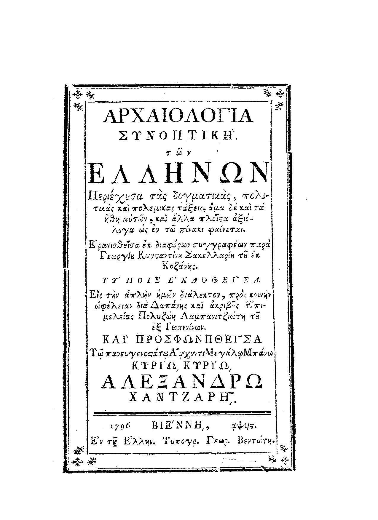 Η σελίδα τίτλου του βιβλίου «Αρχαιολογία συνοπτική των Ελλήνων», όπως τυπώθηκε στη Βιέννη από τον Γ. Βεντότη.